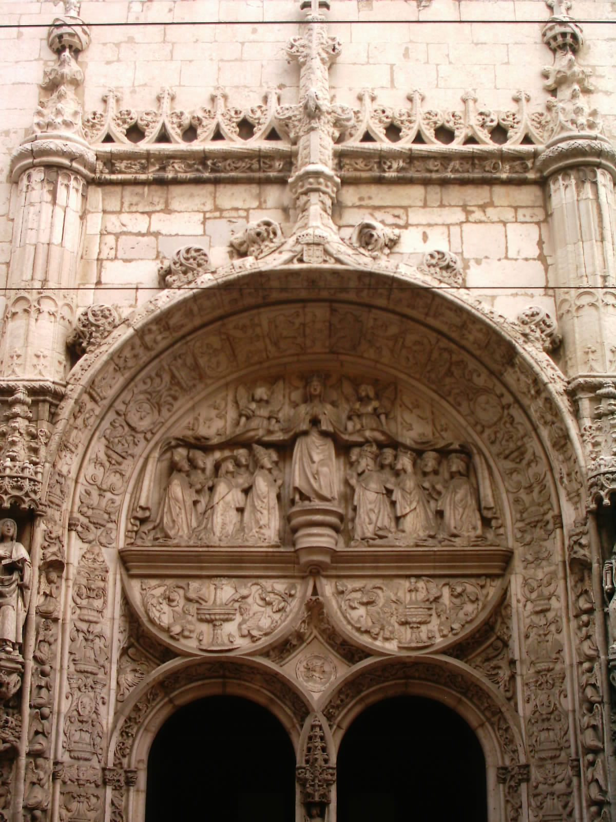 Portal da Igreja de Nossa Senhora da Conceição Velha, Lisboa, Portugal.